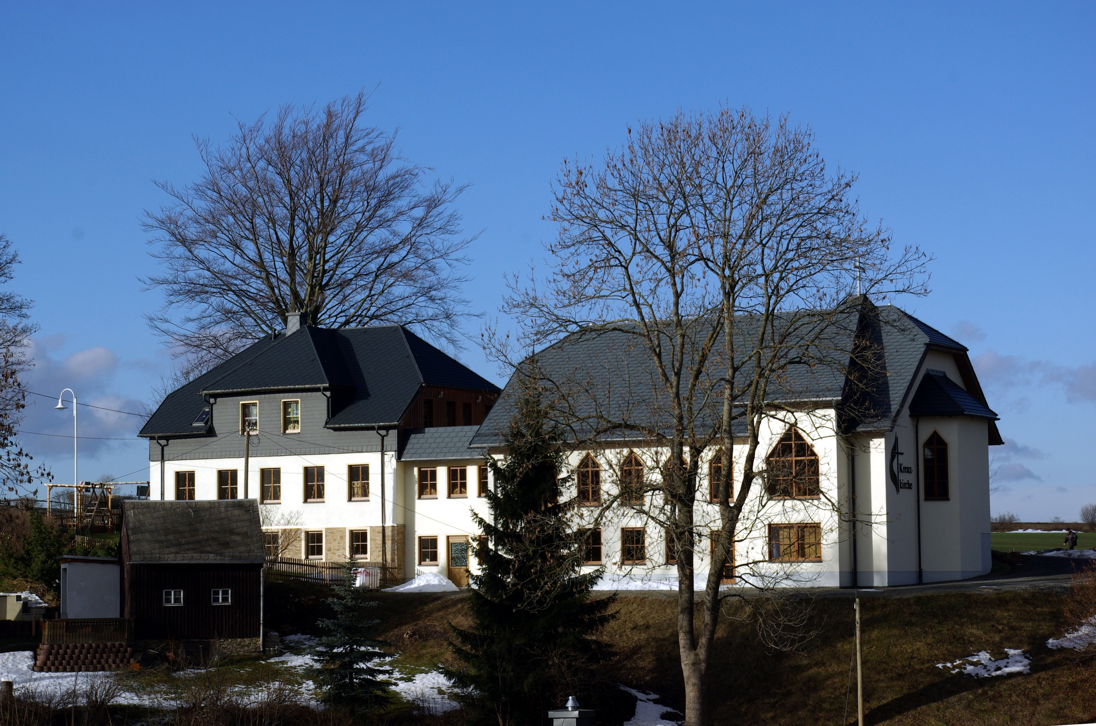 EMK Mildenau